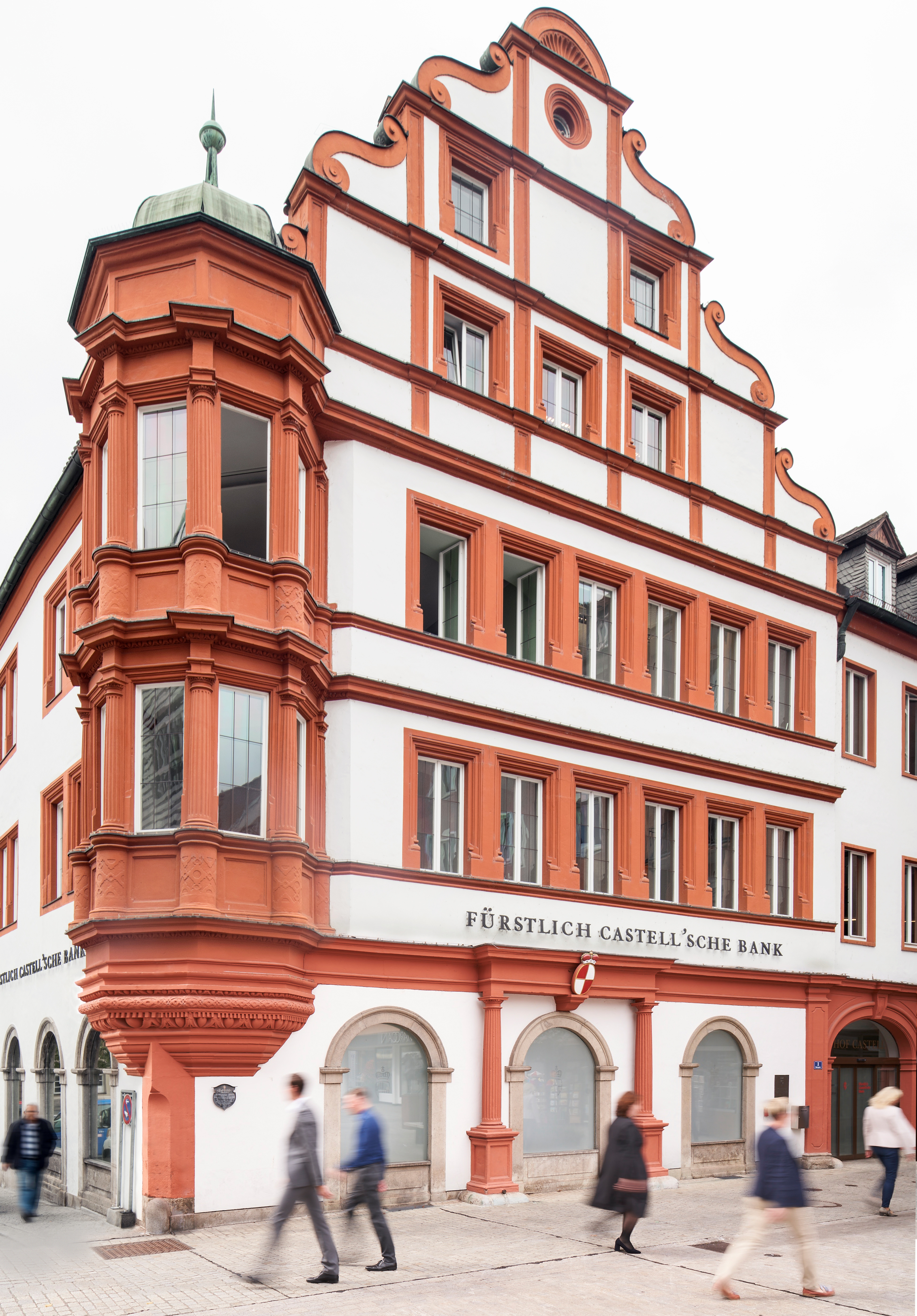 Würzburg - Fürstlich Castell'sche Bank, Credit-Casse AG — Filiale Würzburg (Marktplatz 1), Außenansicht.